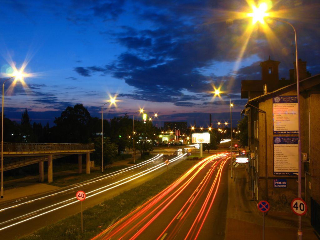 Zielona Góra - ul. Dąbrówki